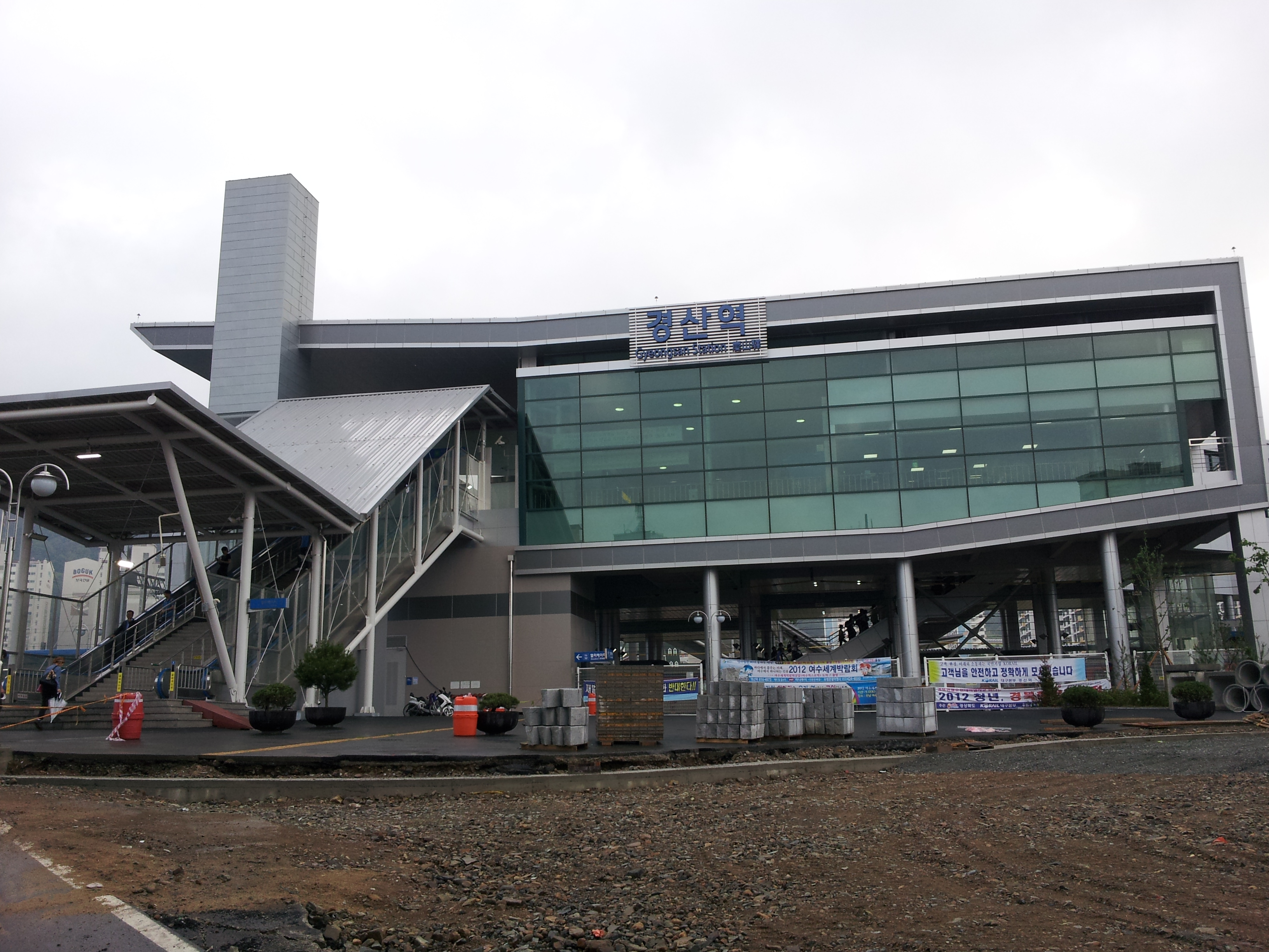 경산역 전경2